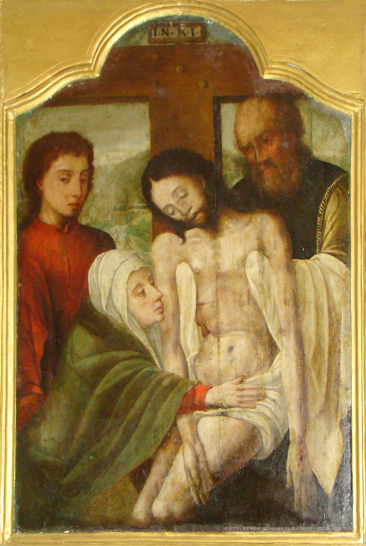 Kreuzabnahme in der Marienkirche in Waren, unbekannter Maler, vermutlich italienisch geprägt. Ursprünglich in Federow, seit 1975 in Waren. Foto: Peter Schmelzle, August 2011